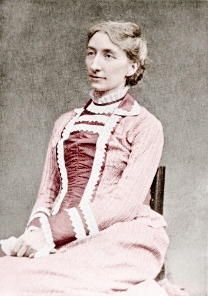 Cosima Wagner, wife of Richard Wagner. Picture taken in London.